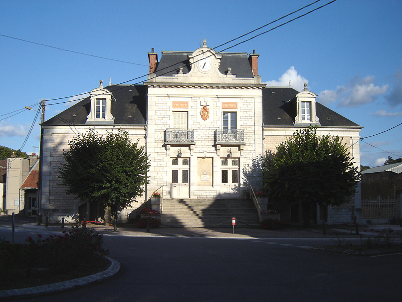 Leo R.